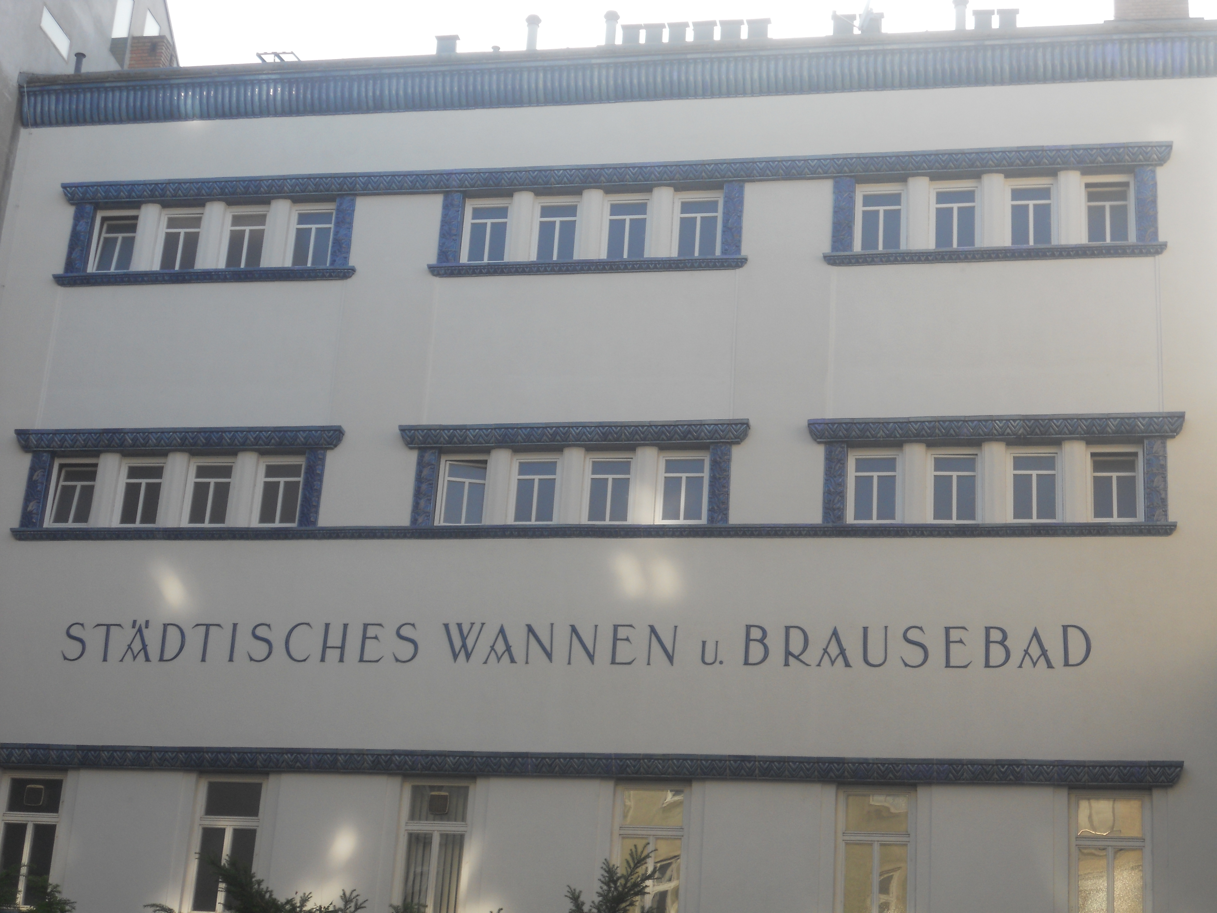 Das Städtische Bad in der Apostelgasse 18 in Wien